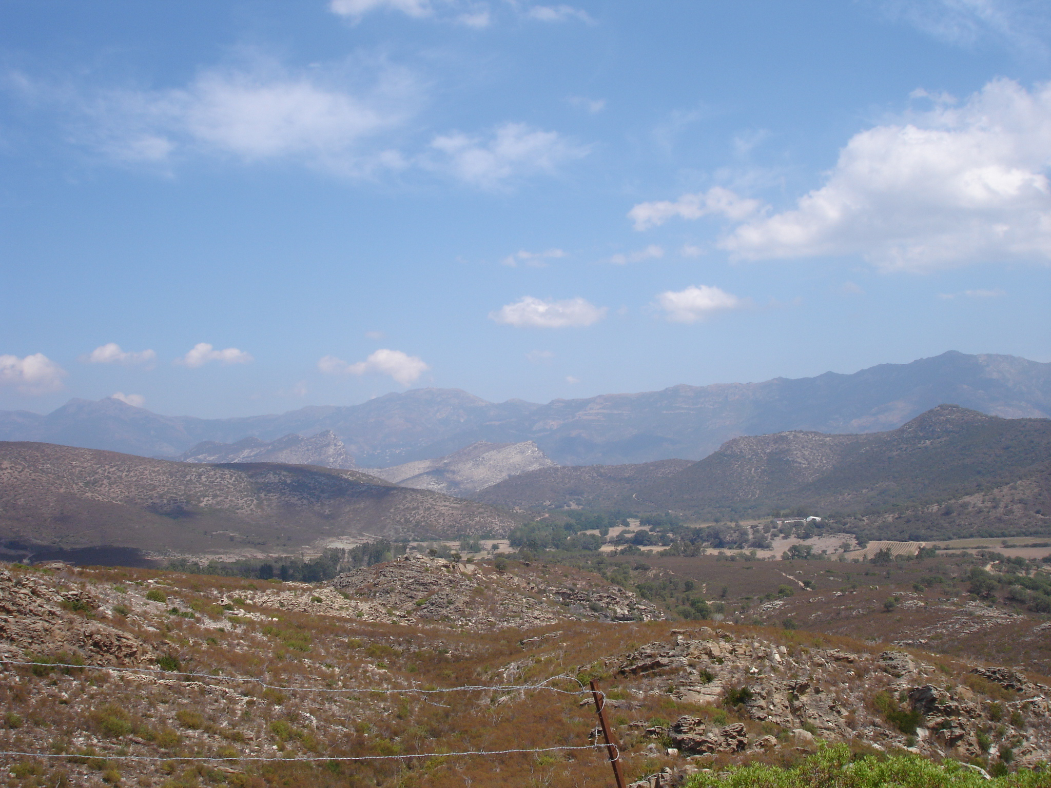 France, Haute-Corse (2B), Désert des Agriates